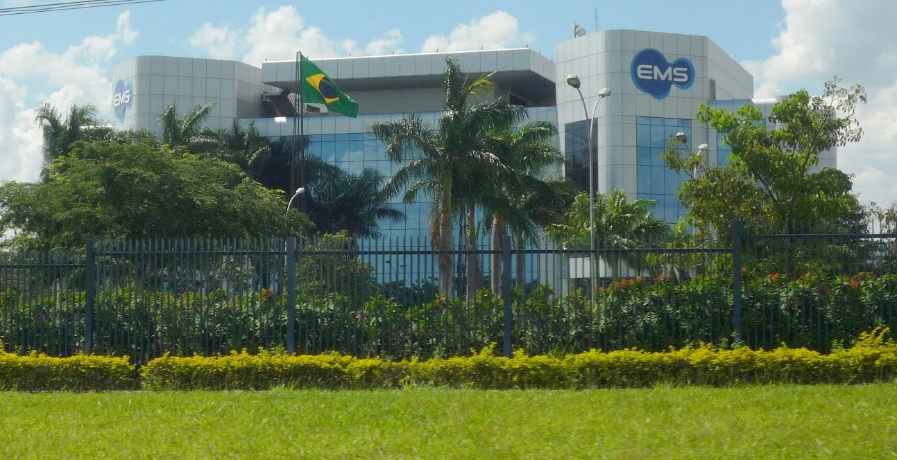 EMS